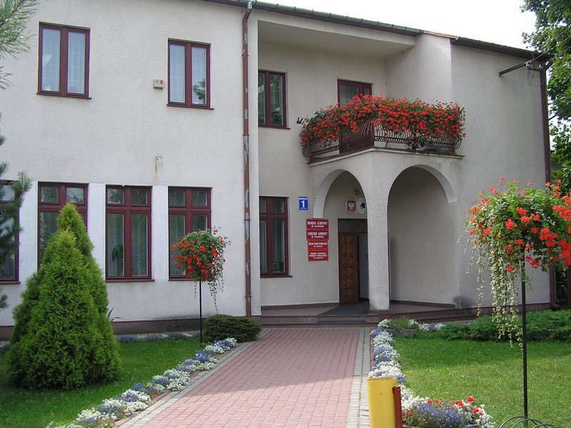 Gmina Dobre